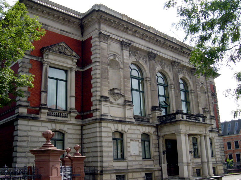 Staatskanzlei Magdeburg (Palais am Fürstenwall)